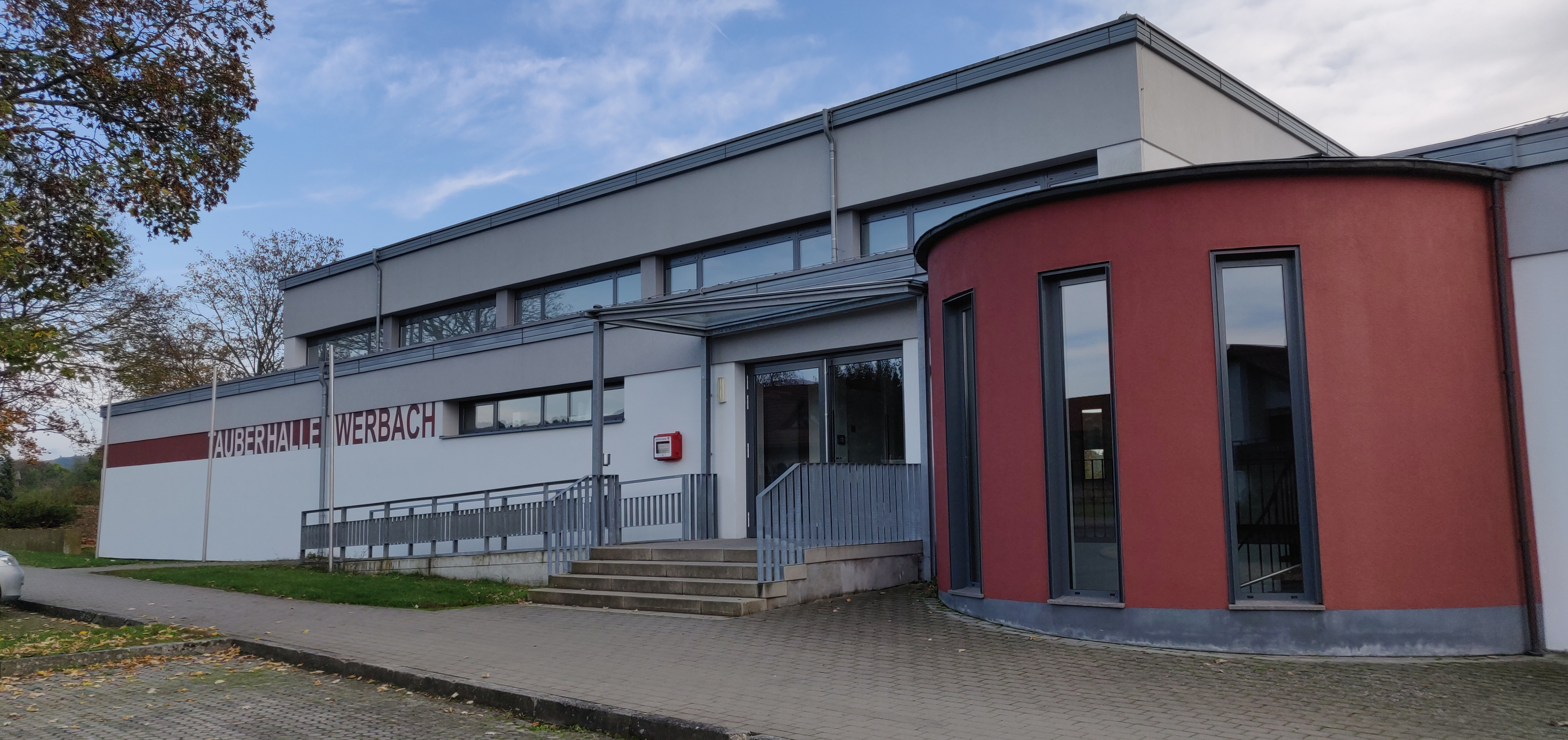 Sportverein